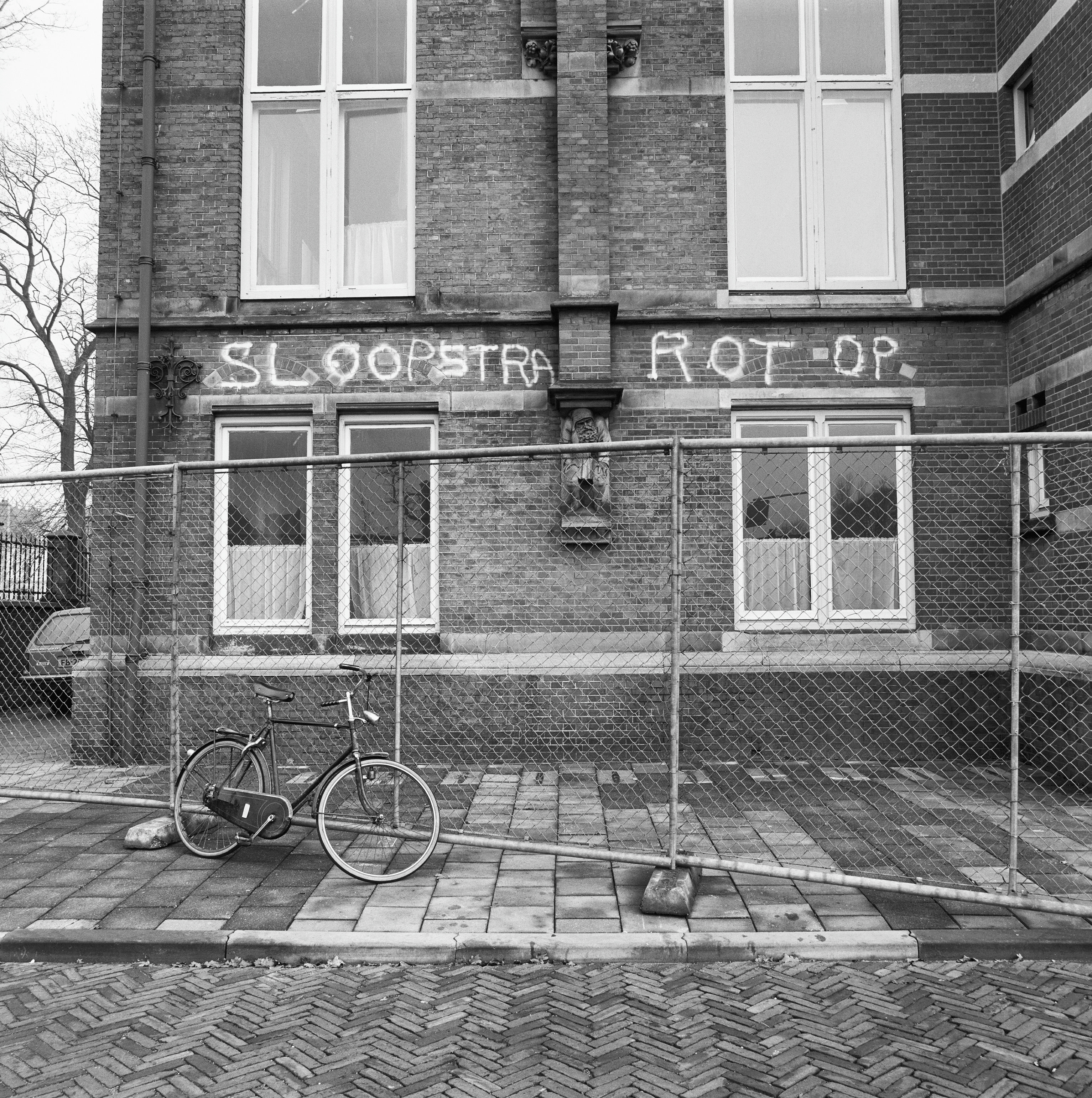 Gouverneurshuis: gedeelte van voorgevel